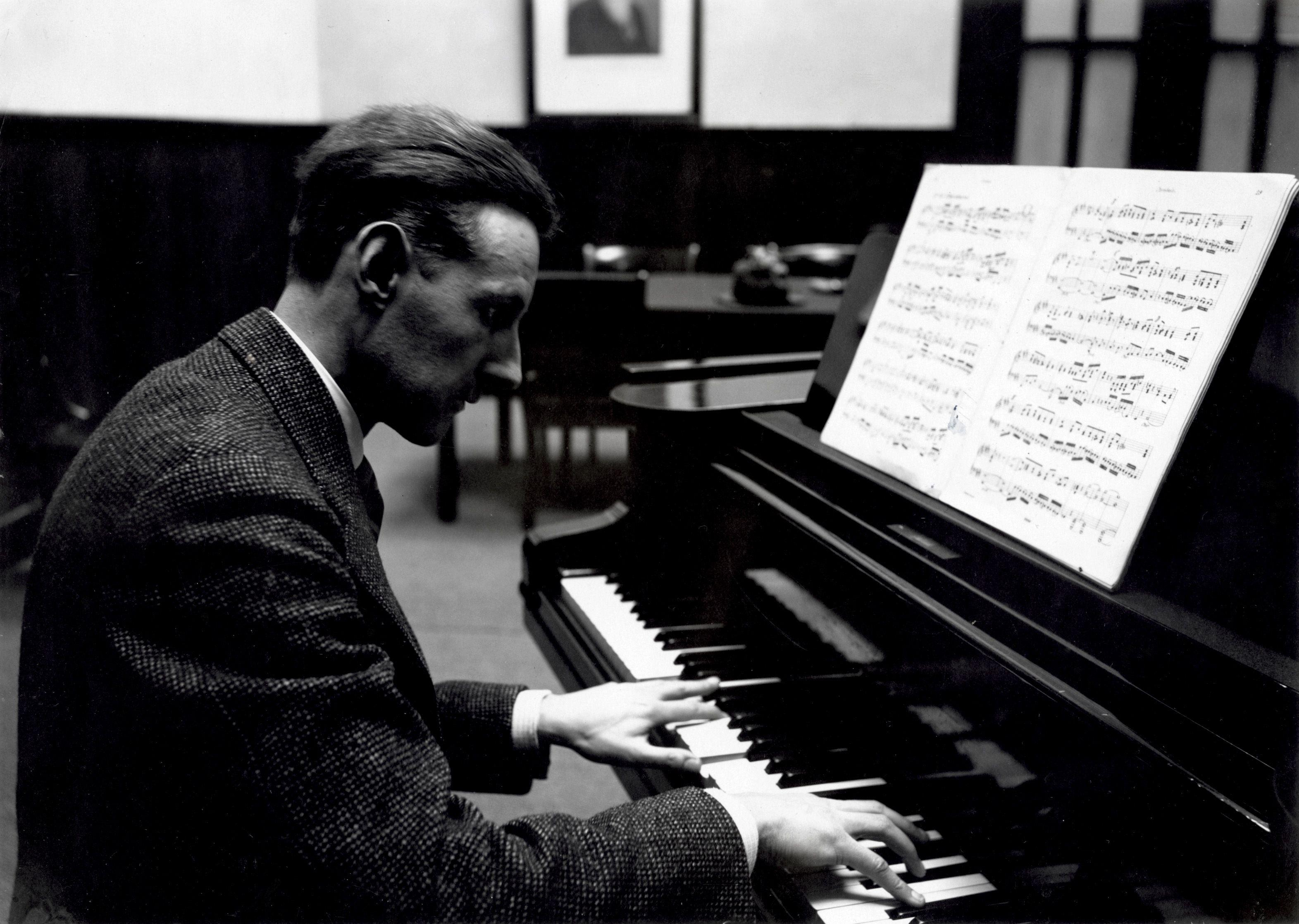 Portret van de Nederlandse componist Willem Pijper (1894-1947) aan de piano. Jaartal onbekend. (ca. 1935?)